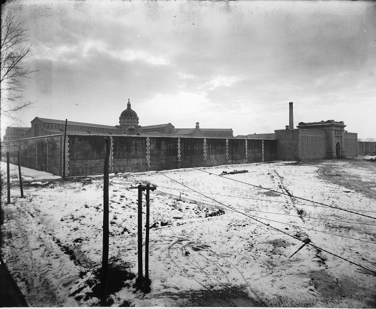 Photographie Prison de Bordeaux, Montréal, QC, 1912 Wm. Notman & Son 1912, 20e siècle Plaque sèche à la gélatine 20 x 25 cm Achat de l'Associated Screen News Ltd. VIEW-12690